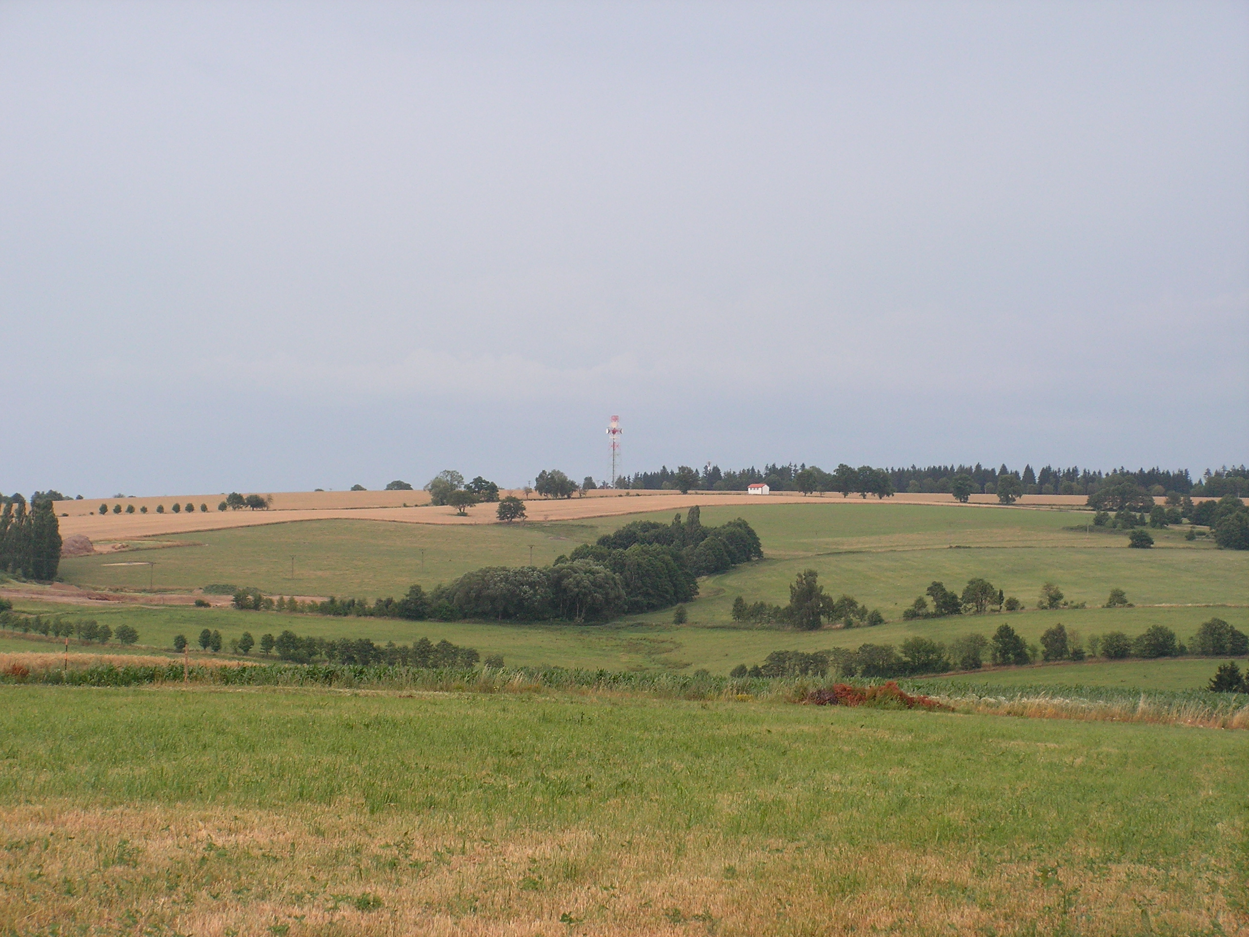 Pohled od Zdeslavic na vrch Borovina, který je druhým nejvyšším vrcholem Světelské pahorkatiny.